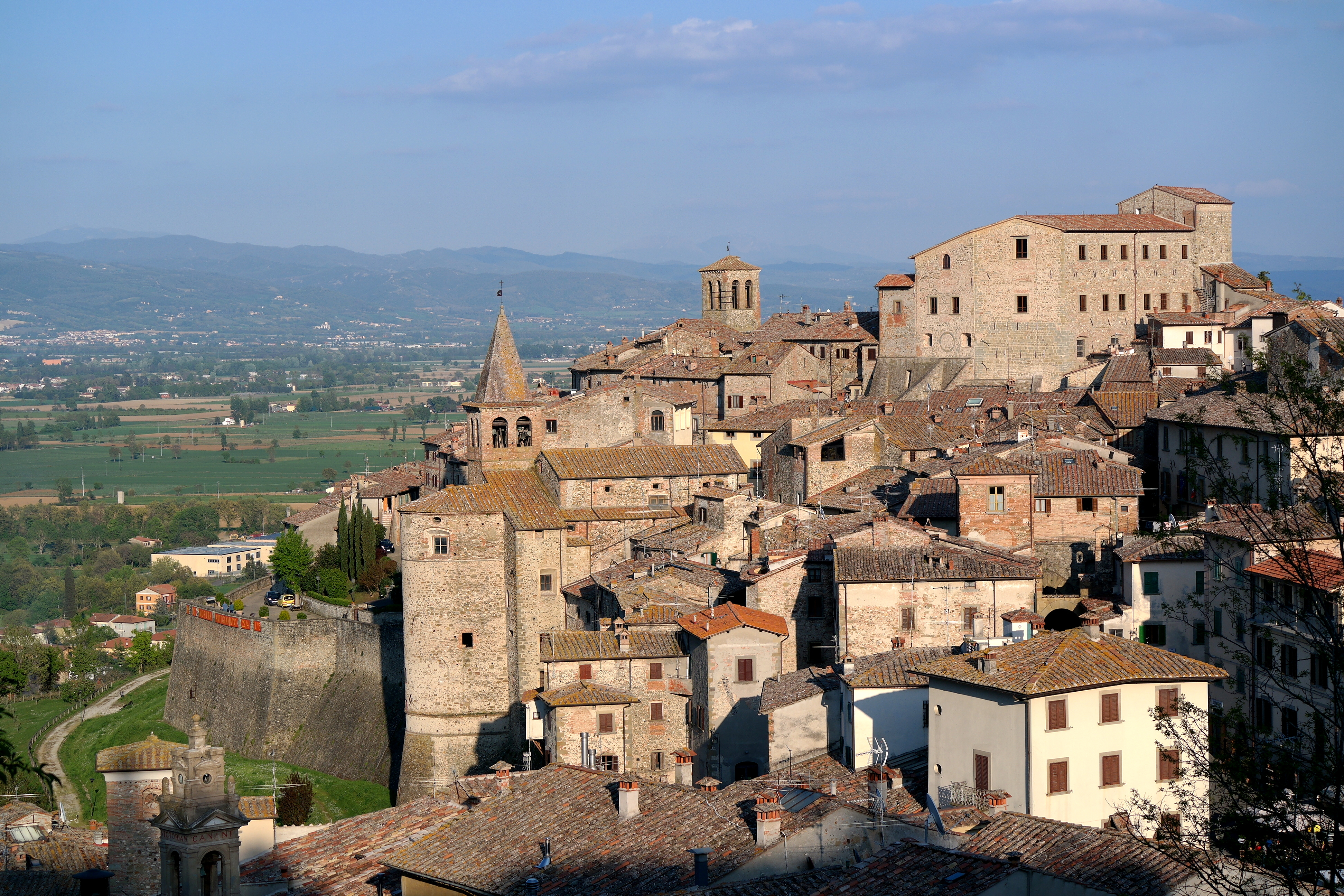 Veduta di Anghiari (Arezzo)